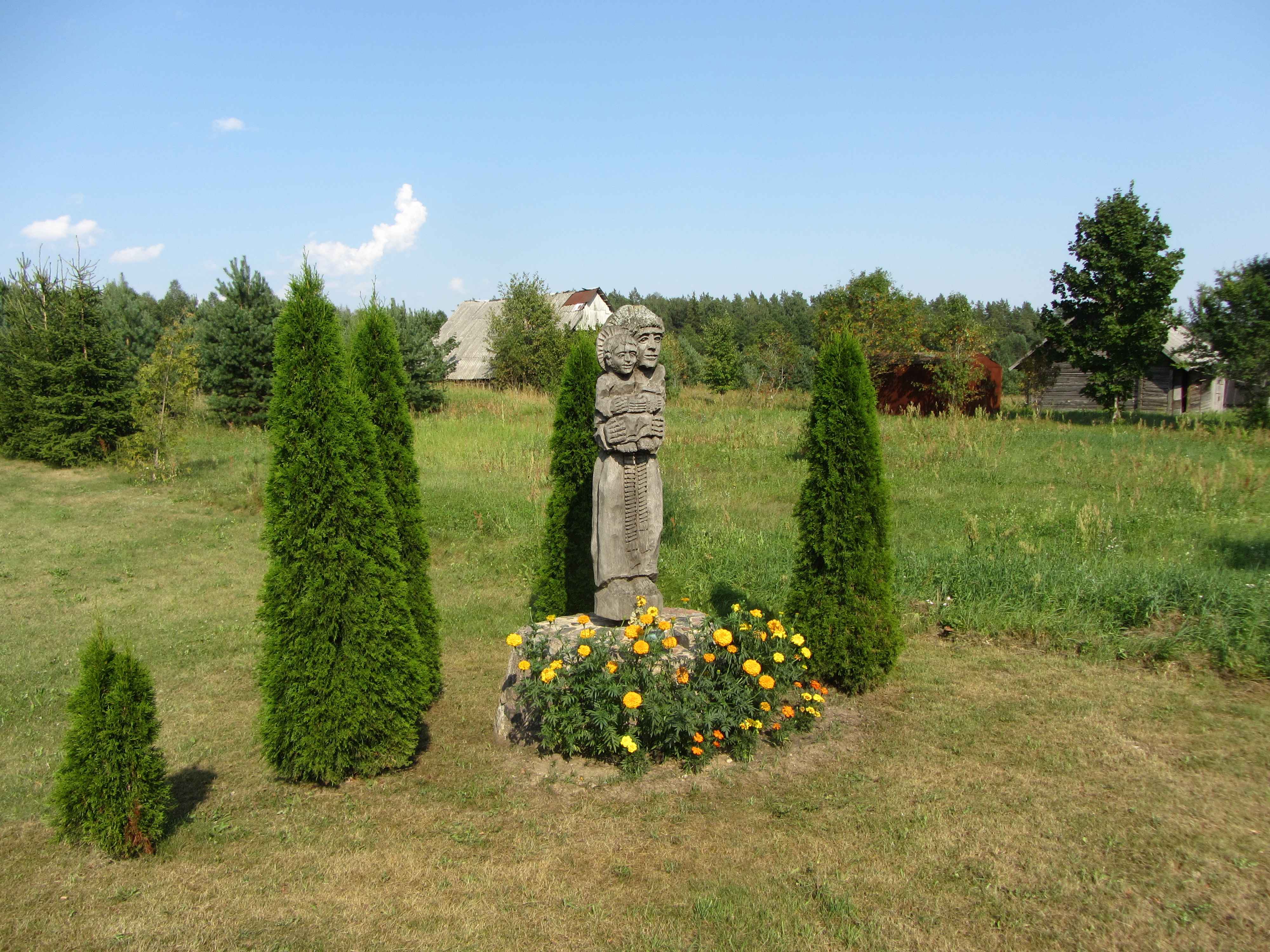 Antakalnis 28332, Lithuania